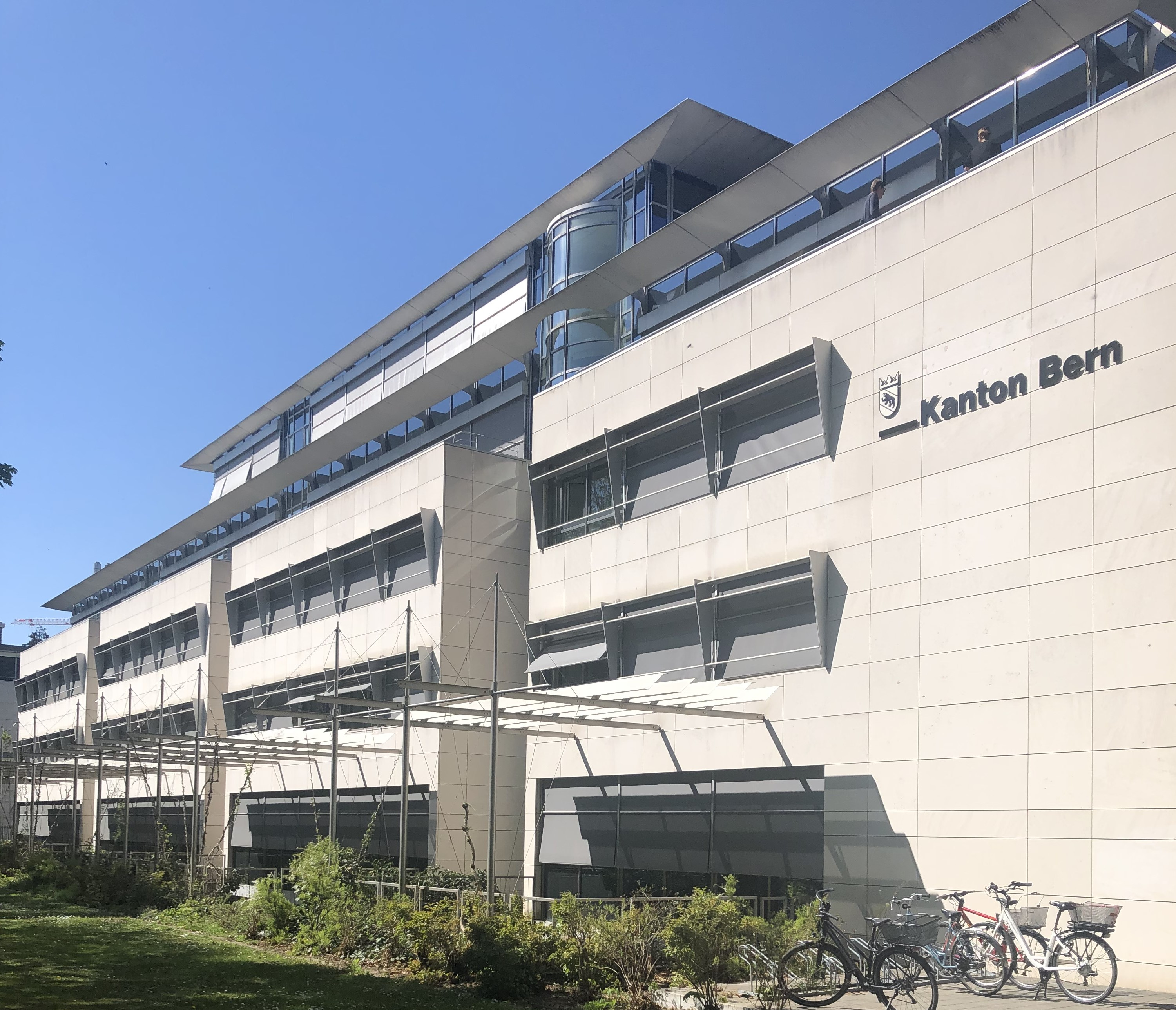 Regionalgericht Bern-Mittelland